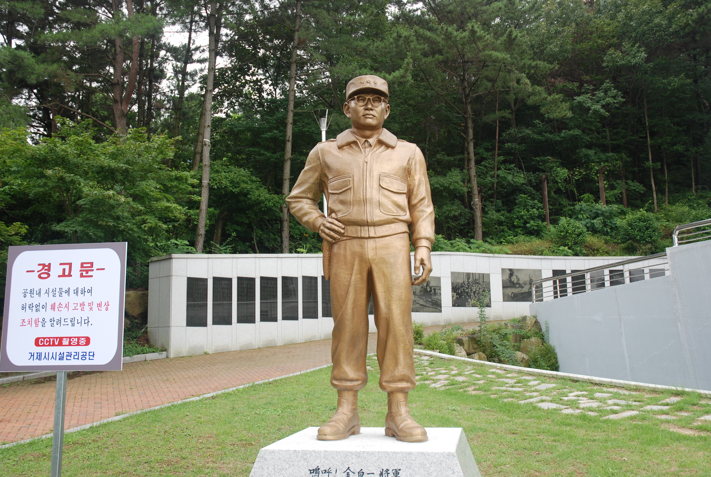 거제포로수용소의 김백일 동상